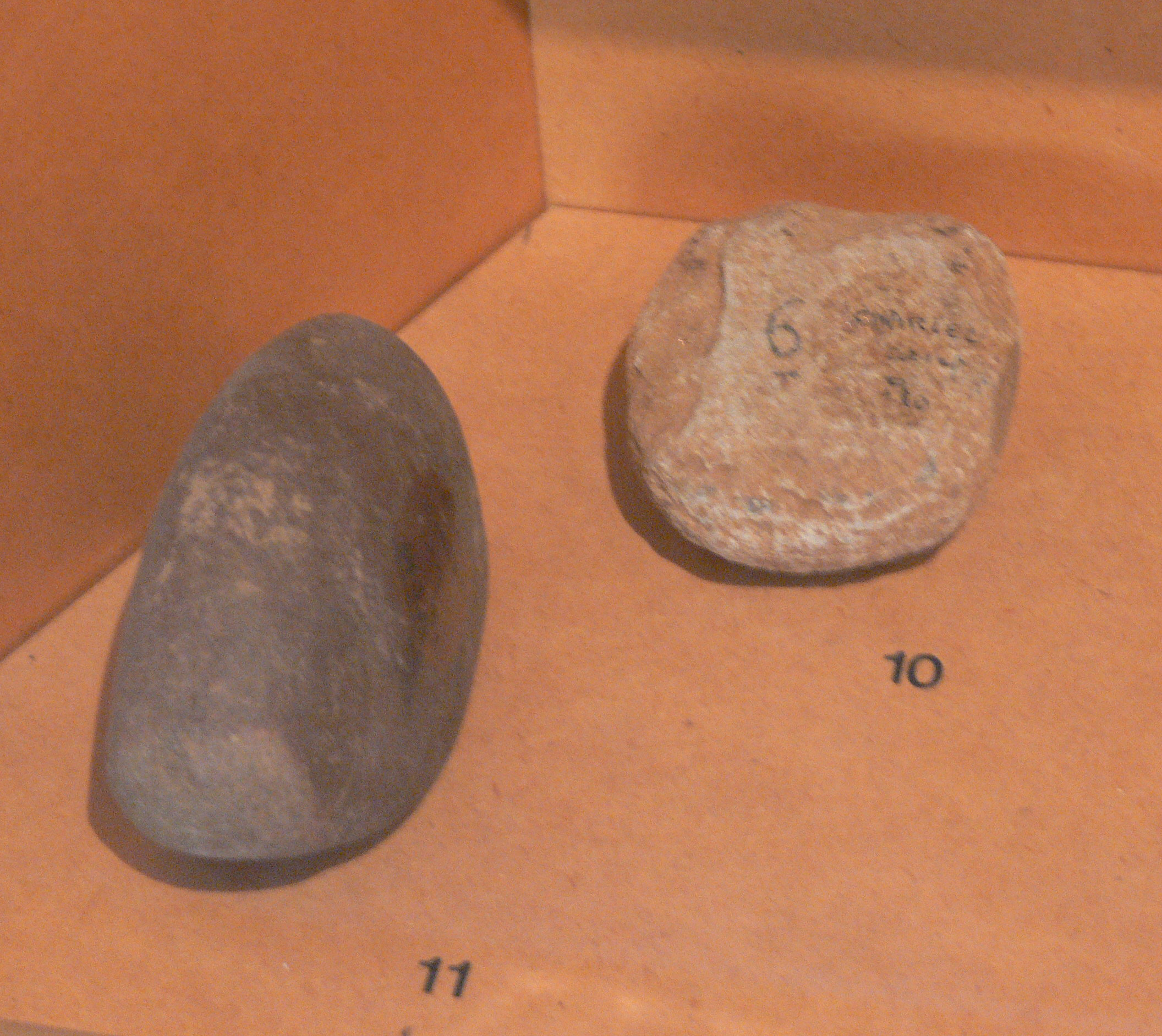 Molette (10) et broyon sur galet (11) du néolithique découverts lors de sondages au « camp de César » à Chariez (Haute-Saône) effectués par la Salsa. Vesoul, musée Georges-Garret